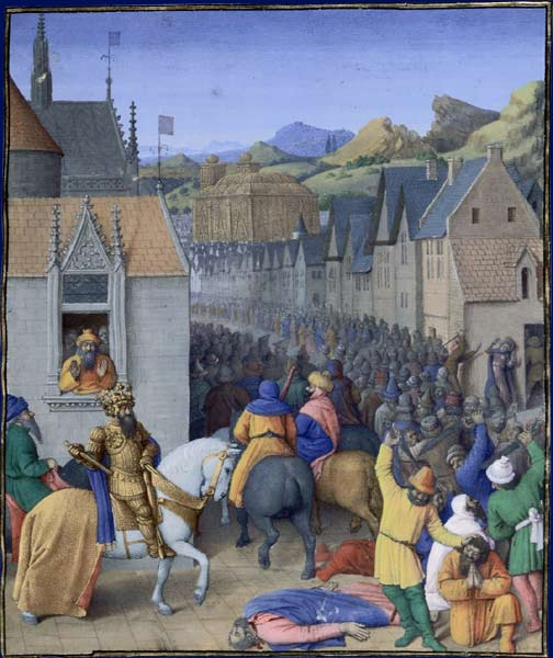 Prise de Jérusalem par Ptolémée Sôtêr vers 320 av. J.-C Flavius Josèphe, Les Antiquités judaïques, enluminure de Jean Fouquet, vers 1470-1475 Paris, BnF, département des Manuscrits, Français 247, fol. 248 (Livre XII) Vers 320 av. J.-C., Ptolémée Ier Sôtêr, roi d'Égypte, entre dans Jérusalem le jour du sabbat, massacre les Hébreux et se rend maître de la ville. D'après une autre interprétation, ce pourrait être le retour d'Antiochos Épiphane à Jérusalem, vers 168 av. J.-C.